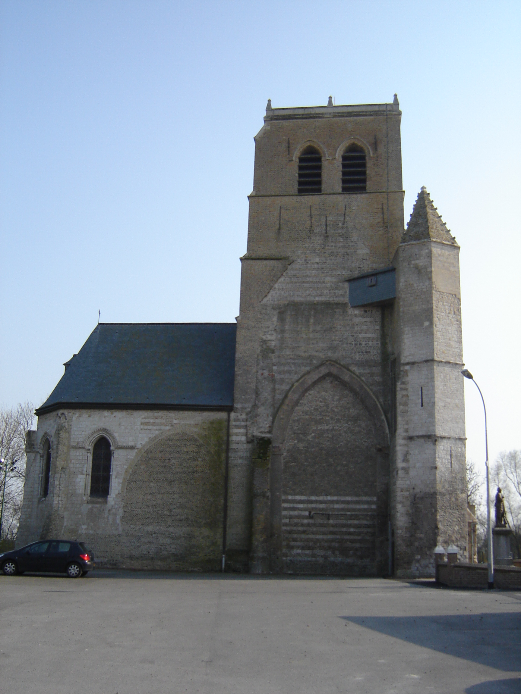 Eglise de Saint-Georges-sur-l'Aa, Nord, Nord-Pas-de-Calais, France